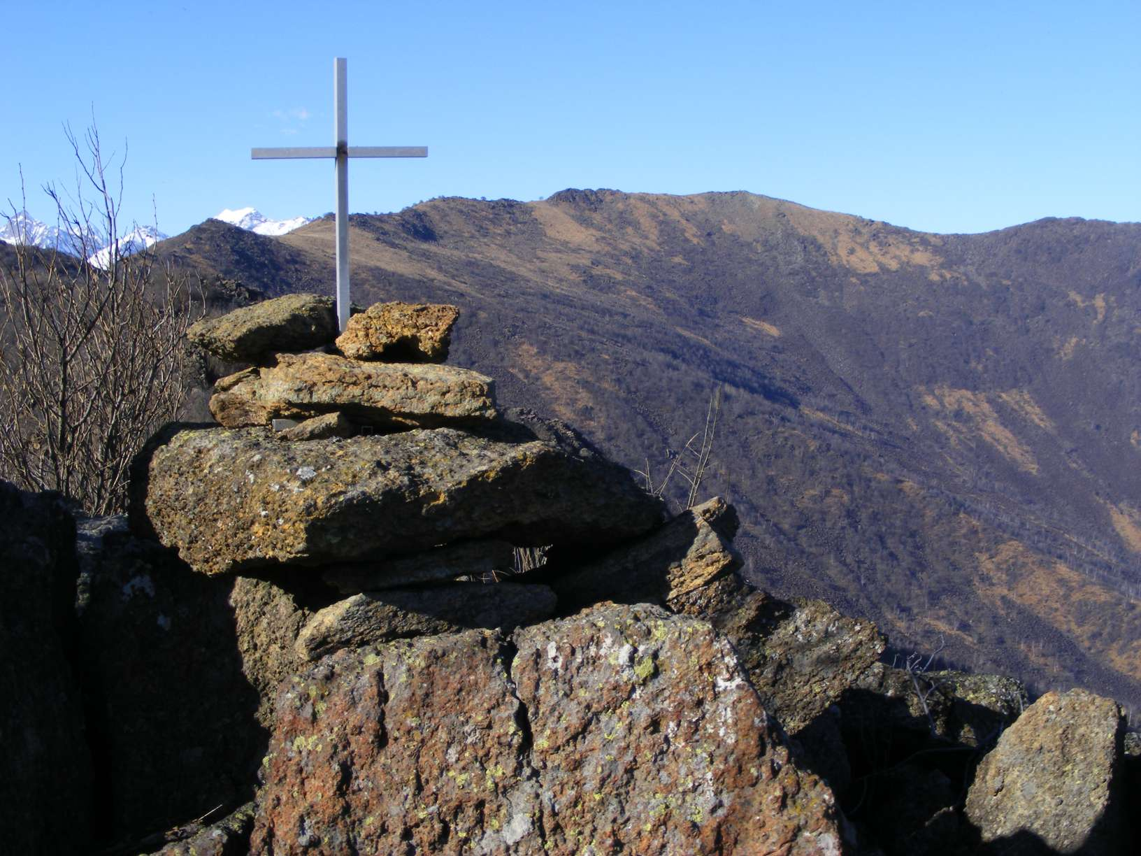 La piccola croce di vetta del Monte Lera (1.368 m); sullo sfondo il Monte Colombano